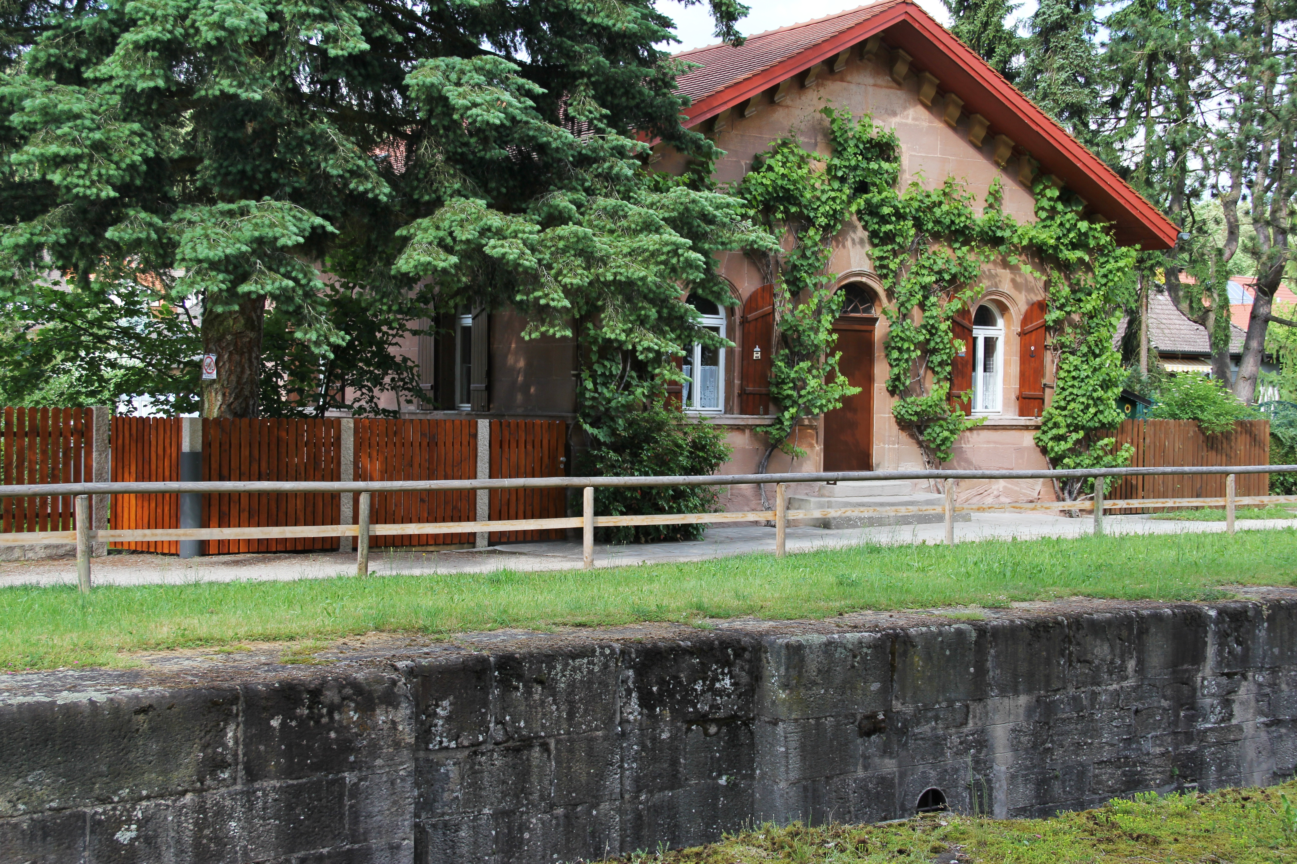 Schleuse 66